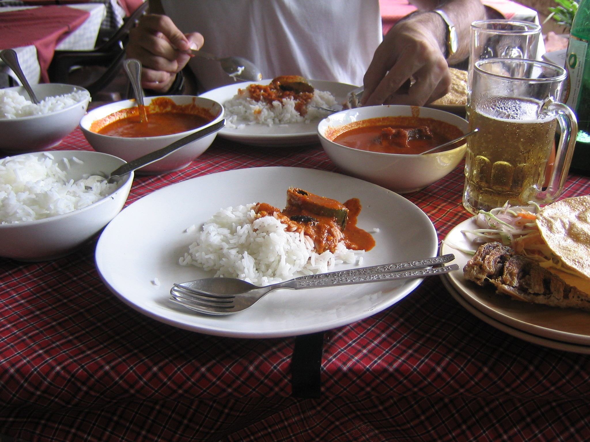 Ambotic, um prato de Goa (fotografia tirada em Margão). Ambotic, a dish from Goa (photo from Margão).